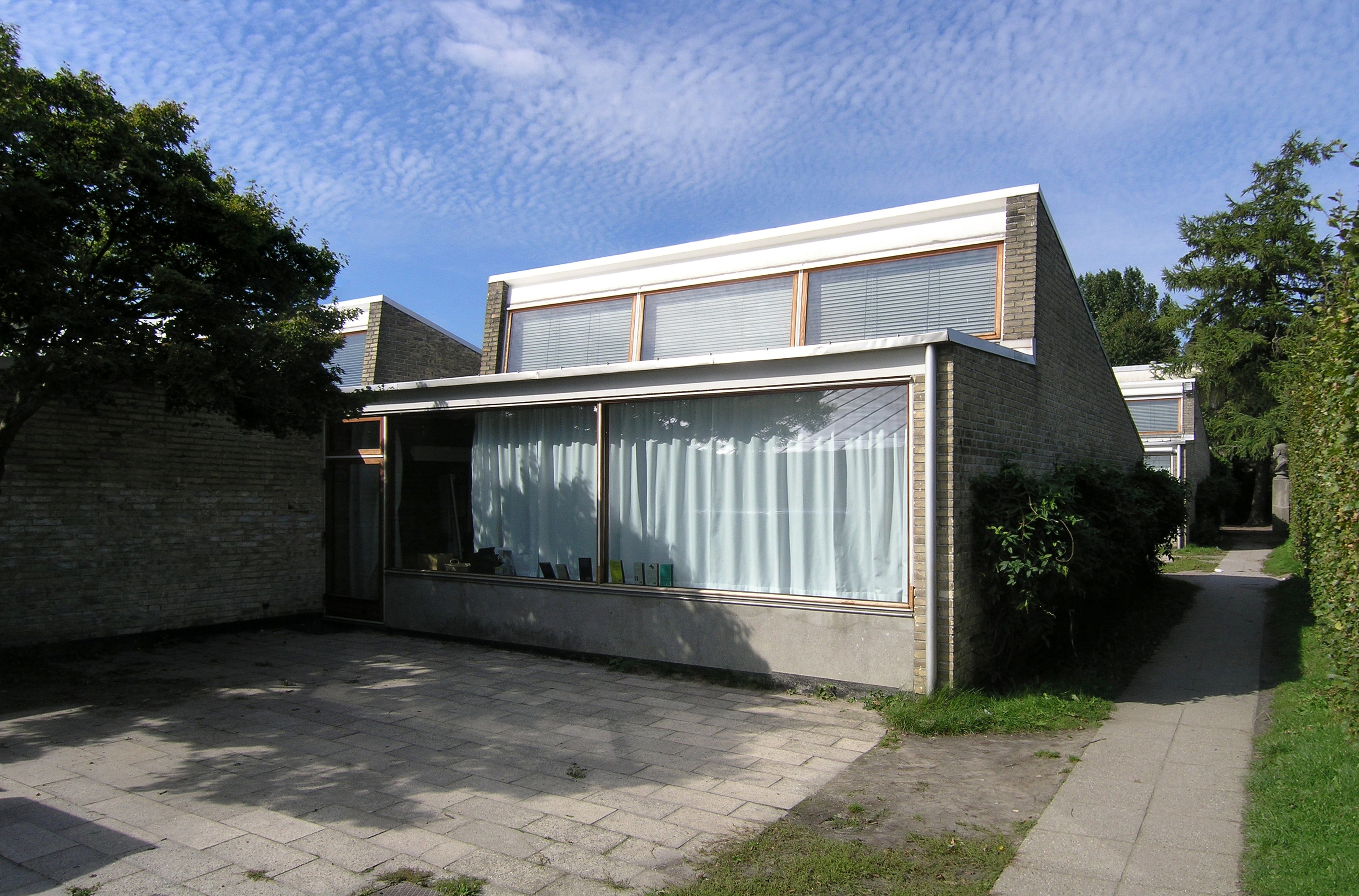 munkegårdsskolen, munkegaard school, søborg, denmark 1948-1957. architect: arne jacobsen, 1902-1971.